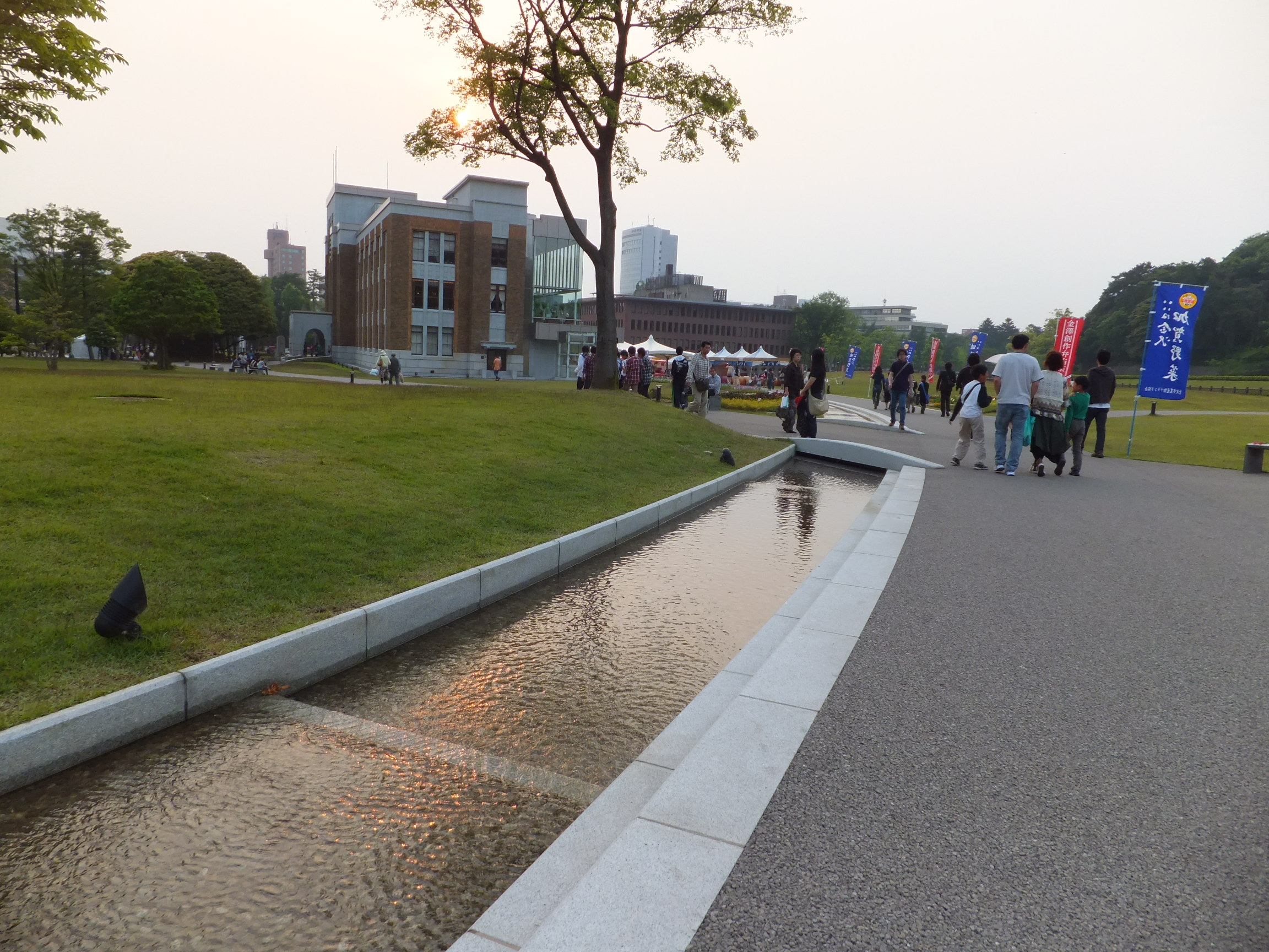 広坂緑地